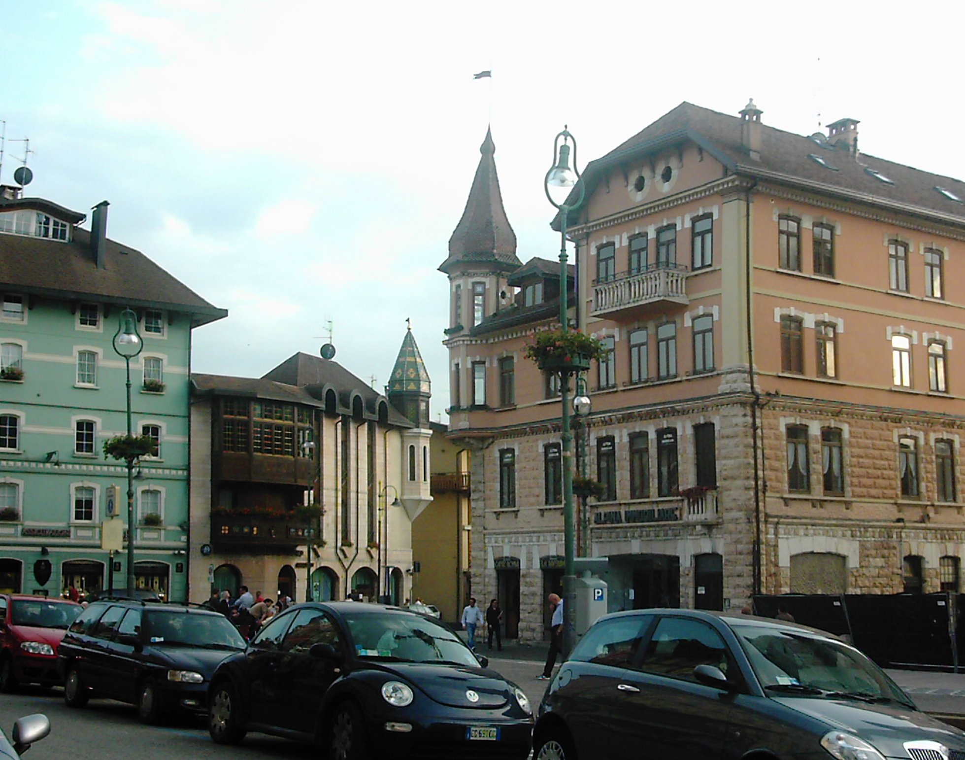 Asiago